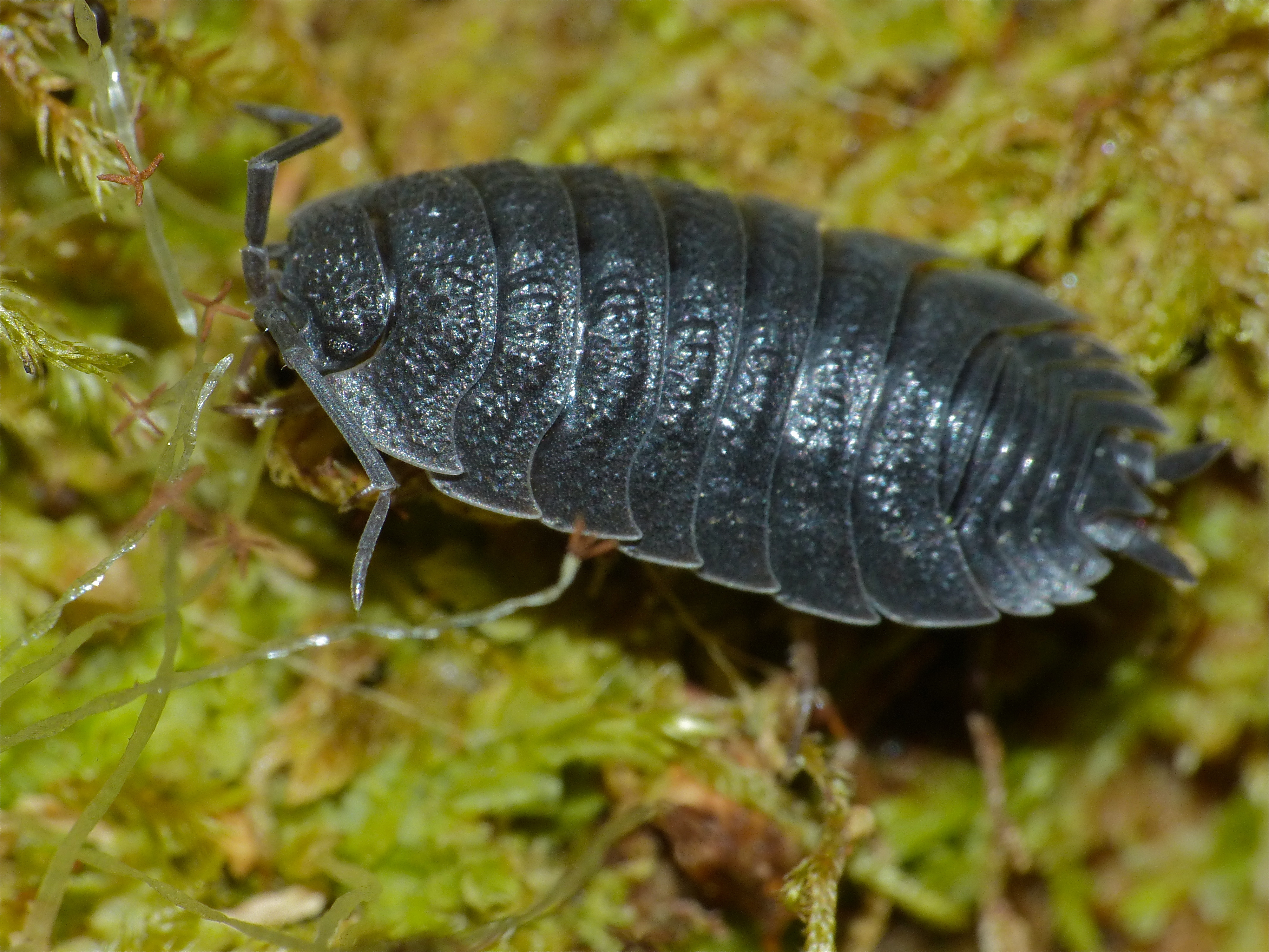 Forêt d' Ecouves, Orne, FRANCE